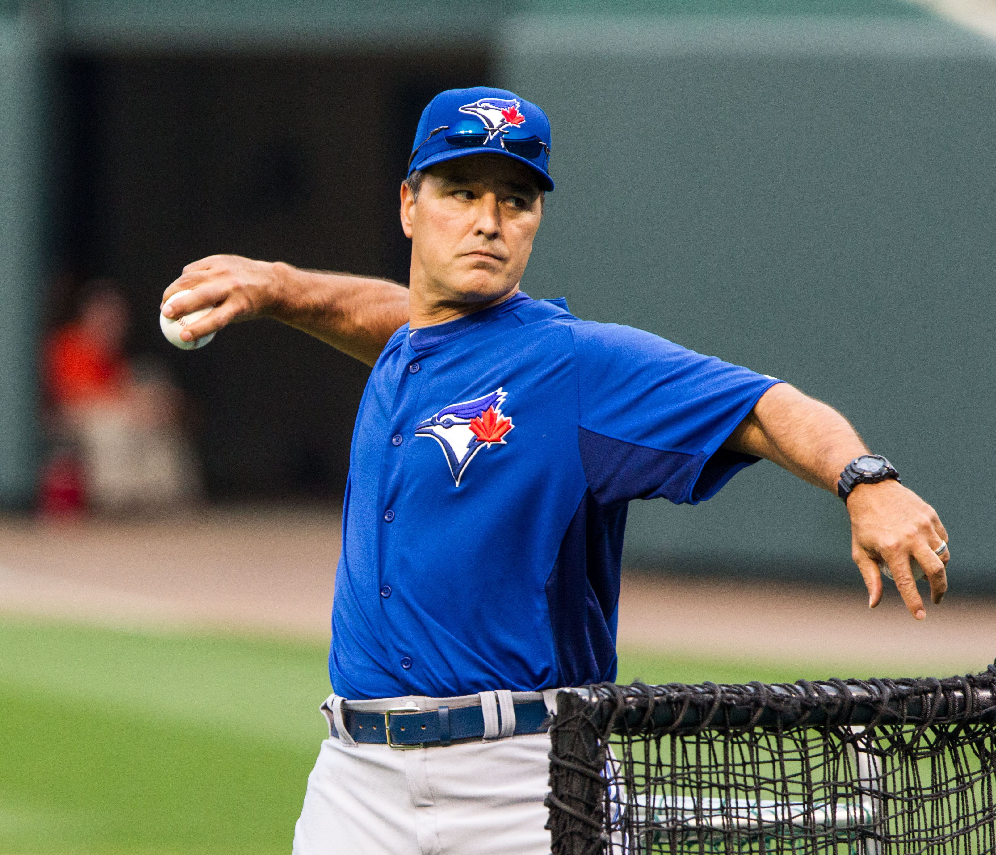 Don Wakamatsu